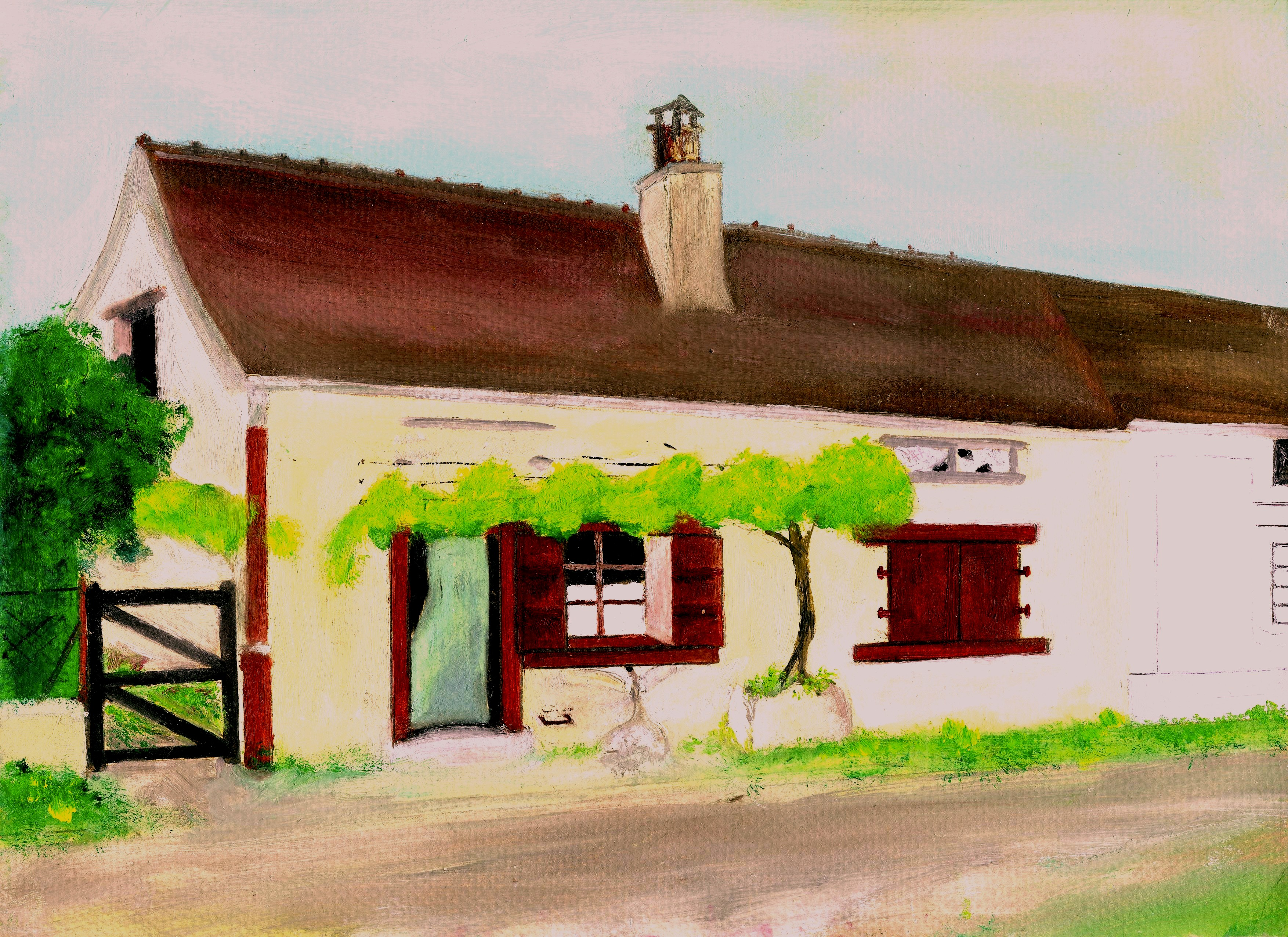 Maison de l'ex-cité ouvrière de Sainte-Colombe-sur-Seine